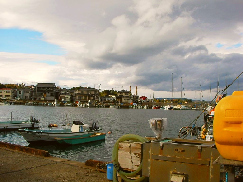 小浜港ー七ヶ浜１